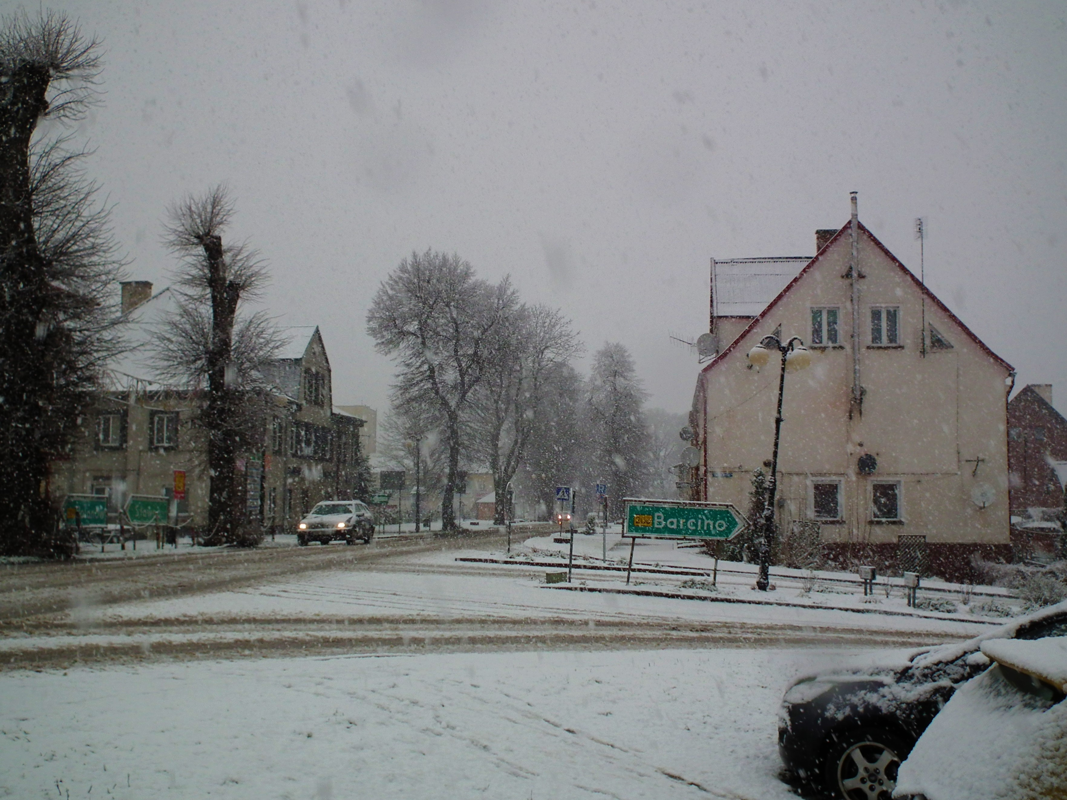 Centrum Kępic w śniegu - styczeń 2020 r.